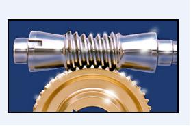 Envolvência do sistema globoidal